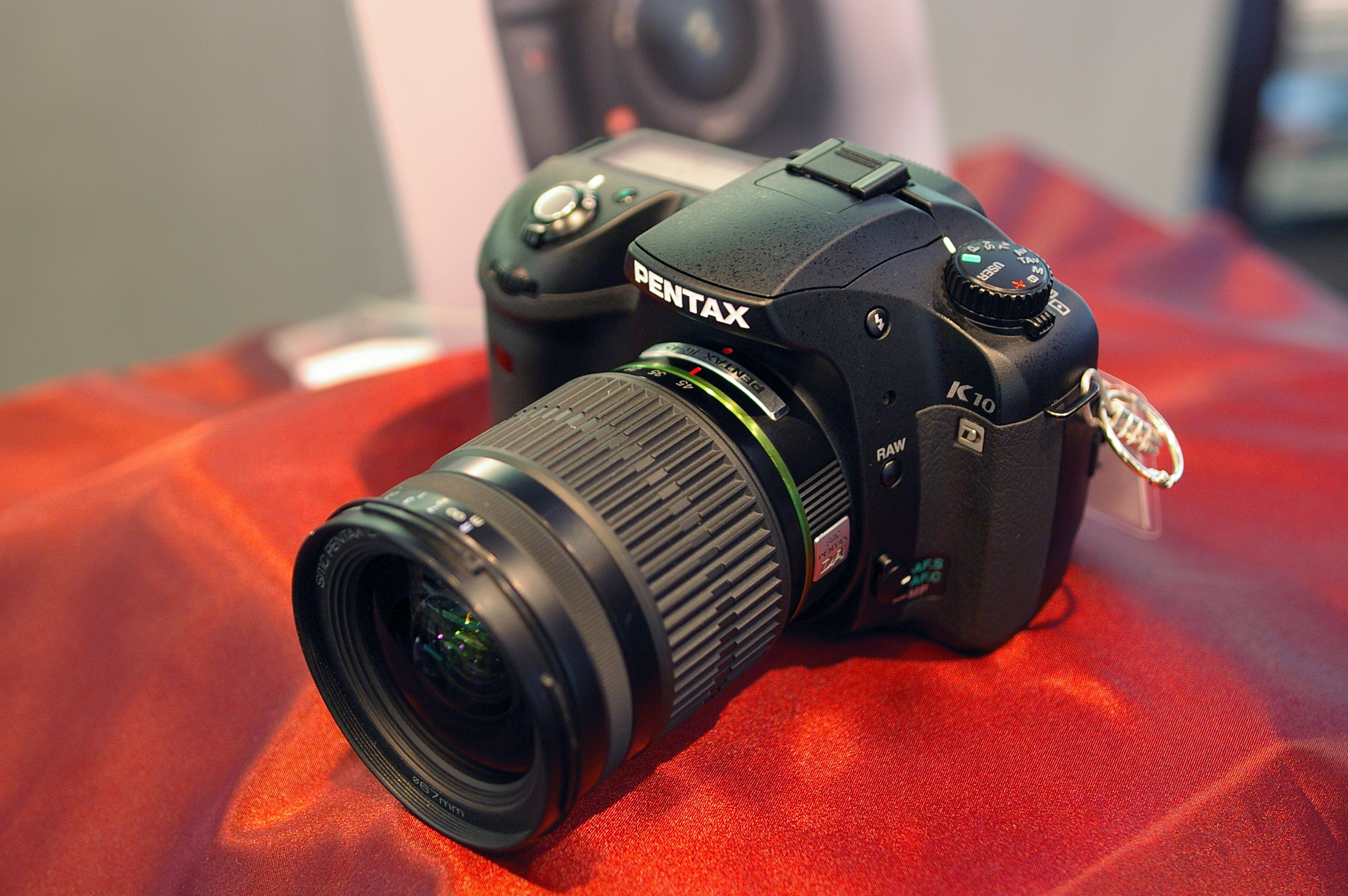 Pentax K10D digital SLR camera